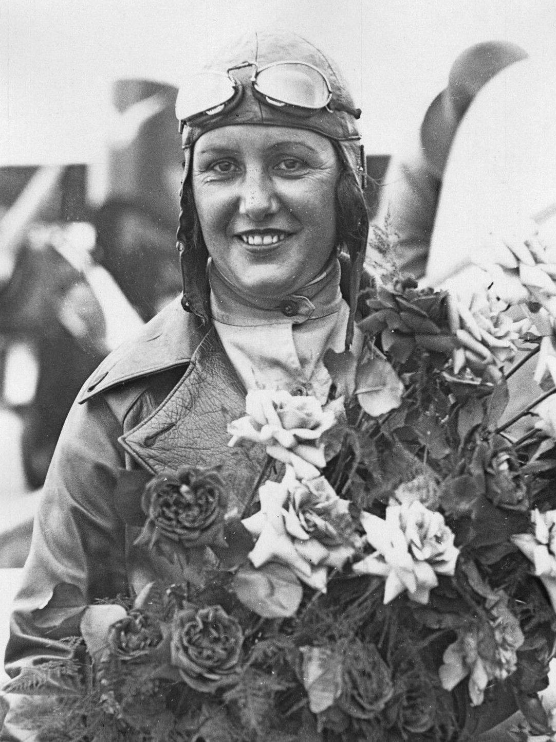 "Maryse Bastié : Trophée en 1932" Photo originale G. DEVRED (Agce ROL)